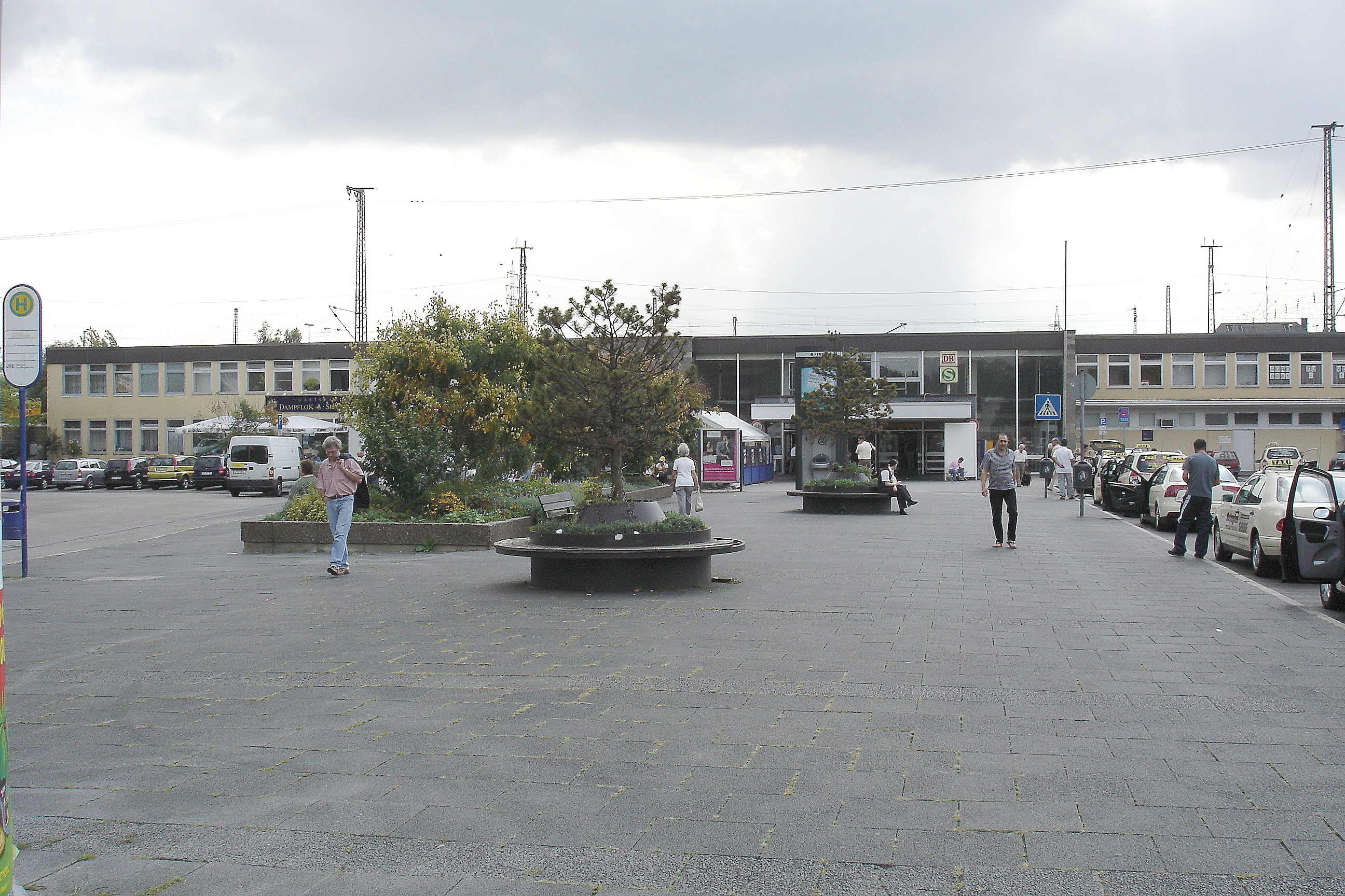 Hauptbahnhof Hanau am Main